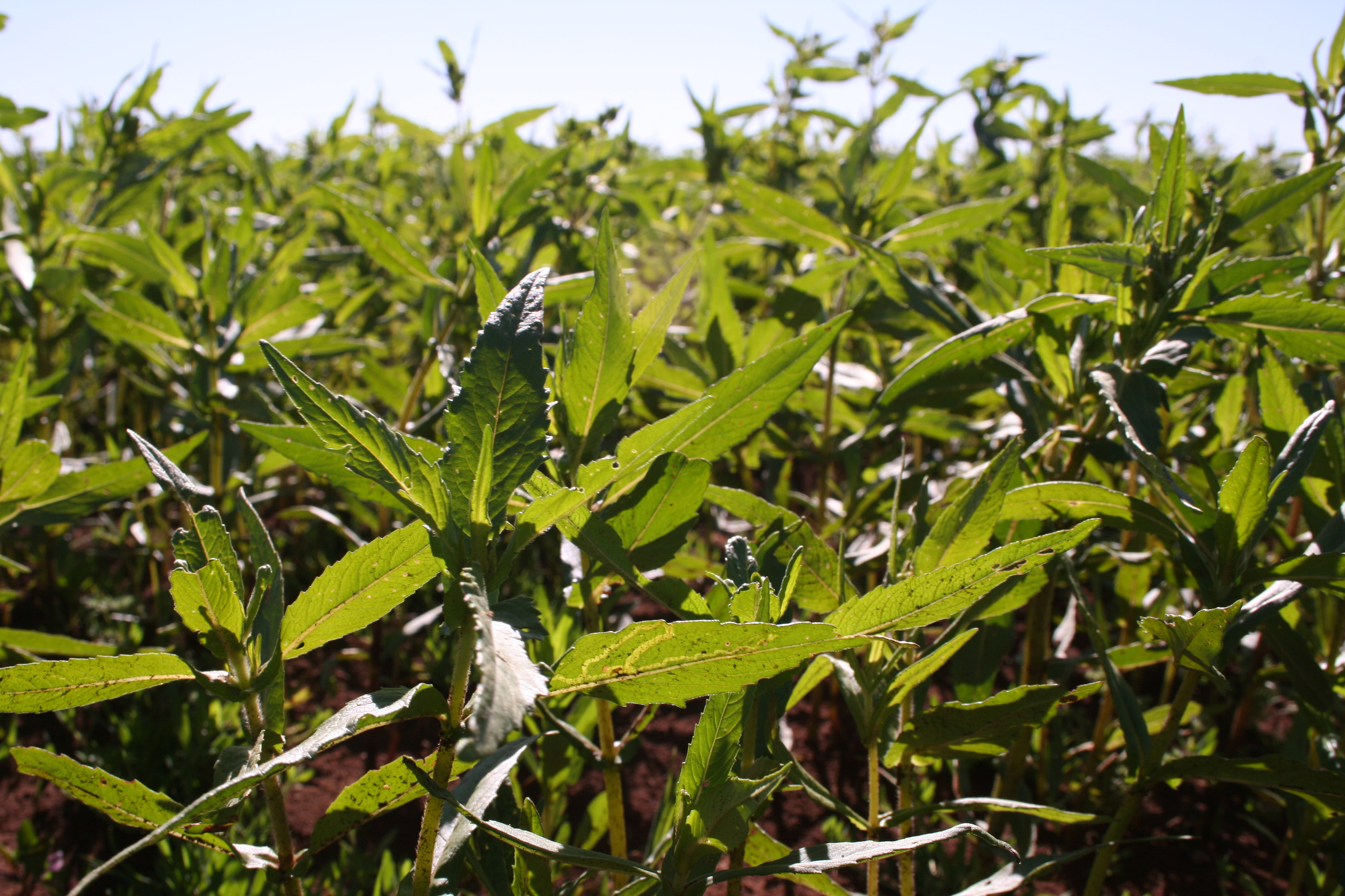 Ramtillkraut ohne Blüte